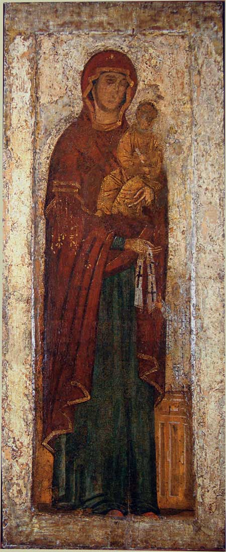 Максимовская икона Божией Матери